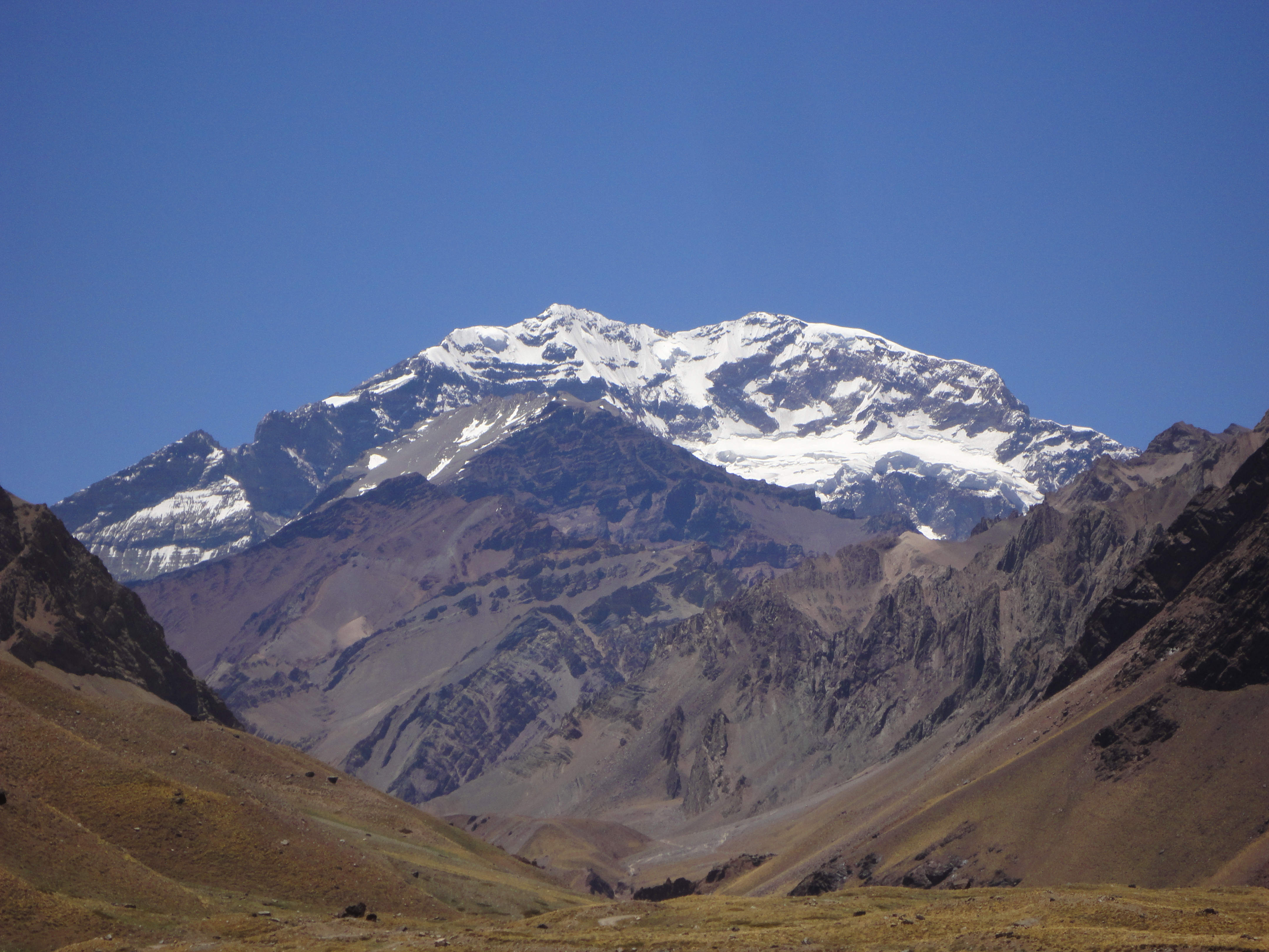 El Centinela de Piedra